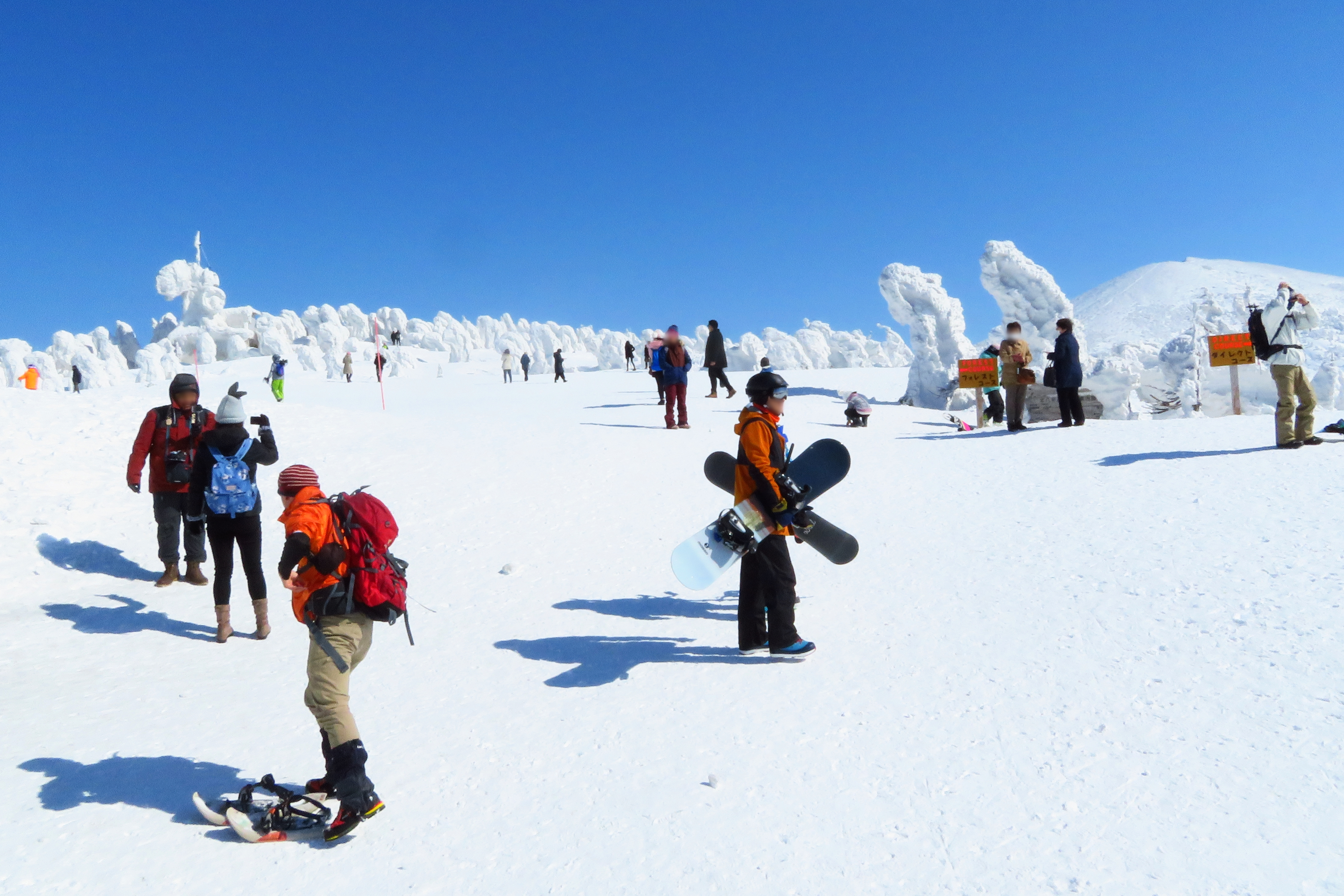 八甲田ロープウェー山頂駅の脇からの風景。右端に赤倉岳。 Canon PowerShot SX720 HS